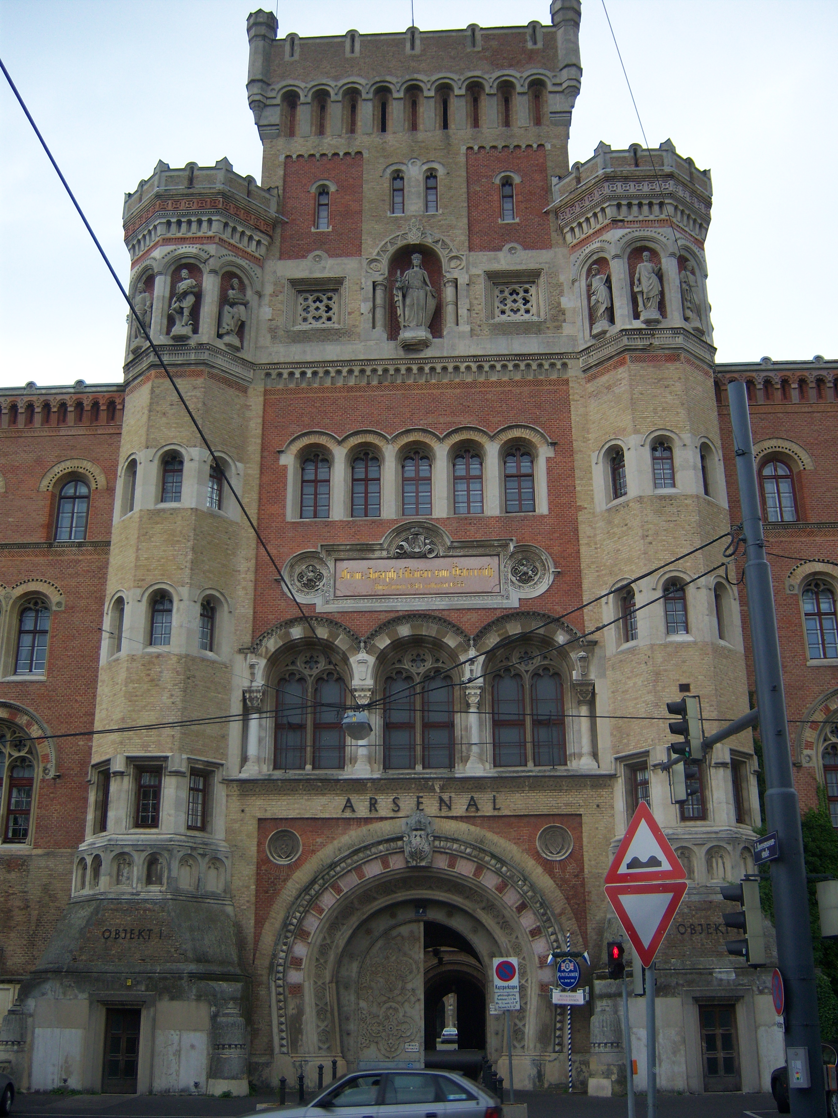 Arsenal Wien Objekt 1